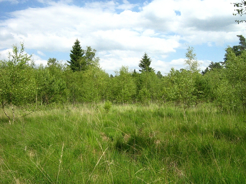 Das Dänschenburger Moor ist eines der größten Hochmoore Norddeutschlands. Durch Wasserabsenkung ist das Moor inzwischen fast vollständig mit Kiefern und Birken bewaldet. (NSG „Großes Moor bei Dänschenburg“ N21, 71 ha, Gemeindegebiet der Stadt Marlow, Landkreis Nordvorpommern, Mecklenburg)